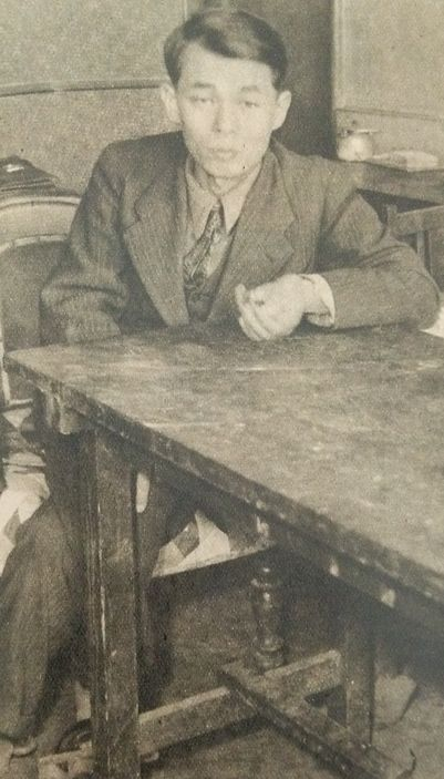 中村誠太郎